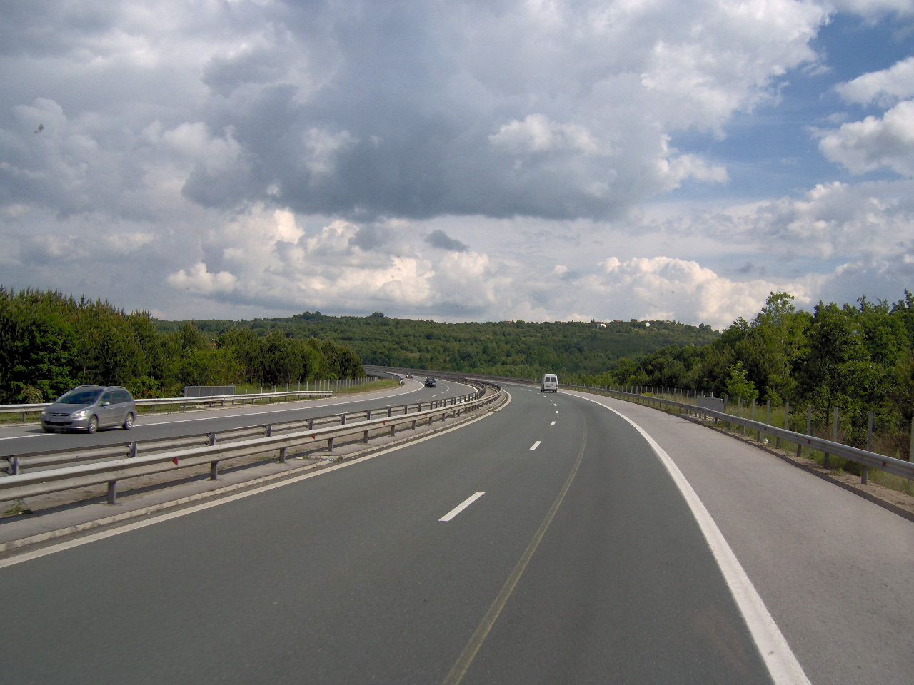 Trakiya highway in Bulgaria.